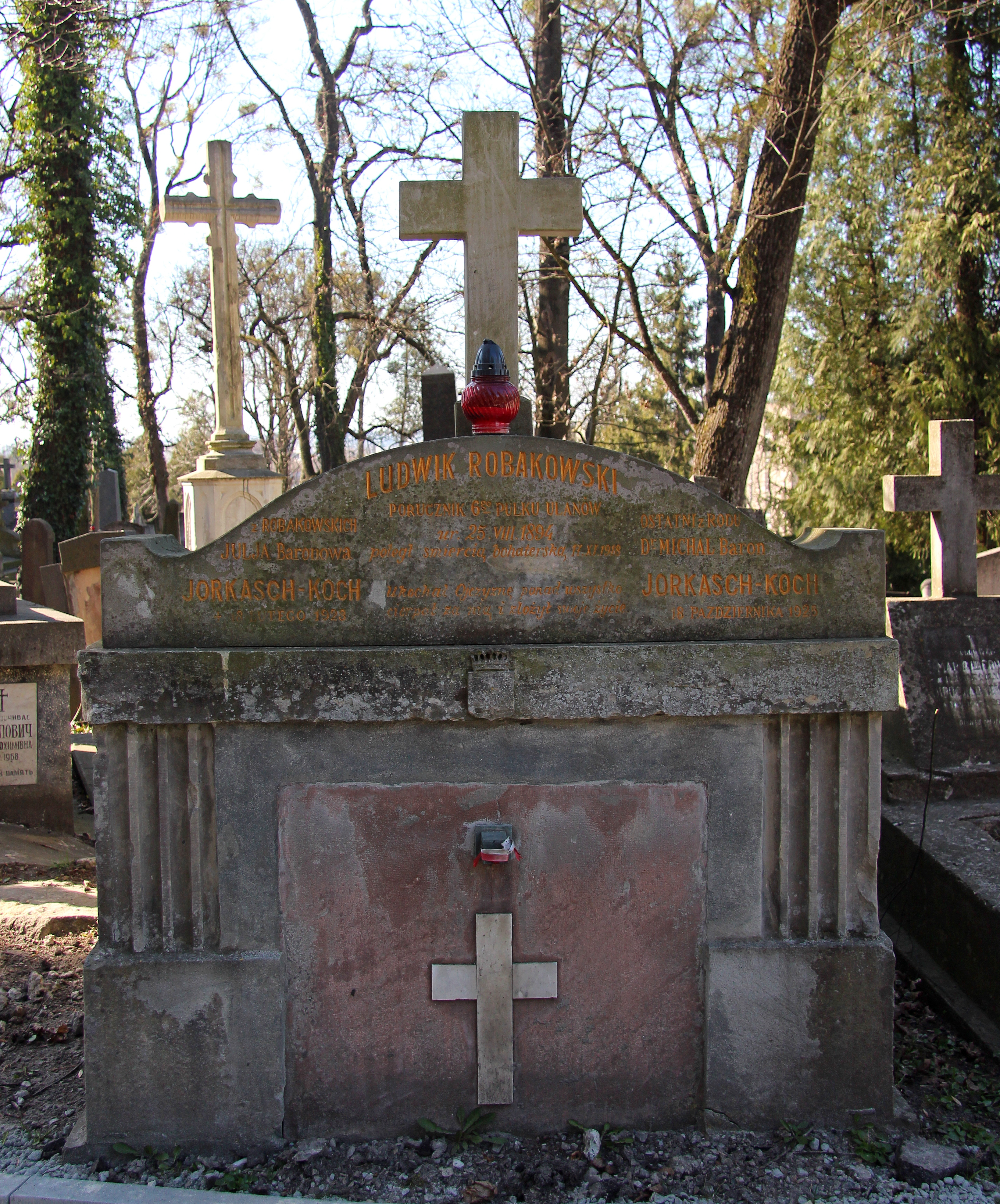 Гробниця родини Йоркаш - Кох. Личаківський цвинтар , поле № 2.